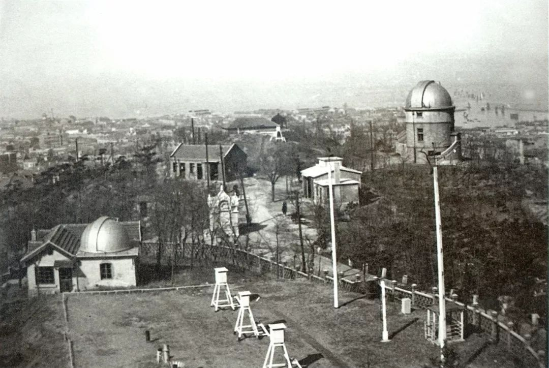 青岛观象山山顶老照片